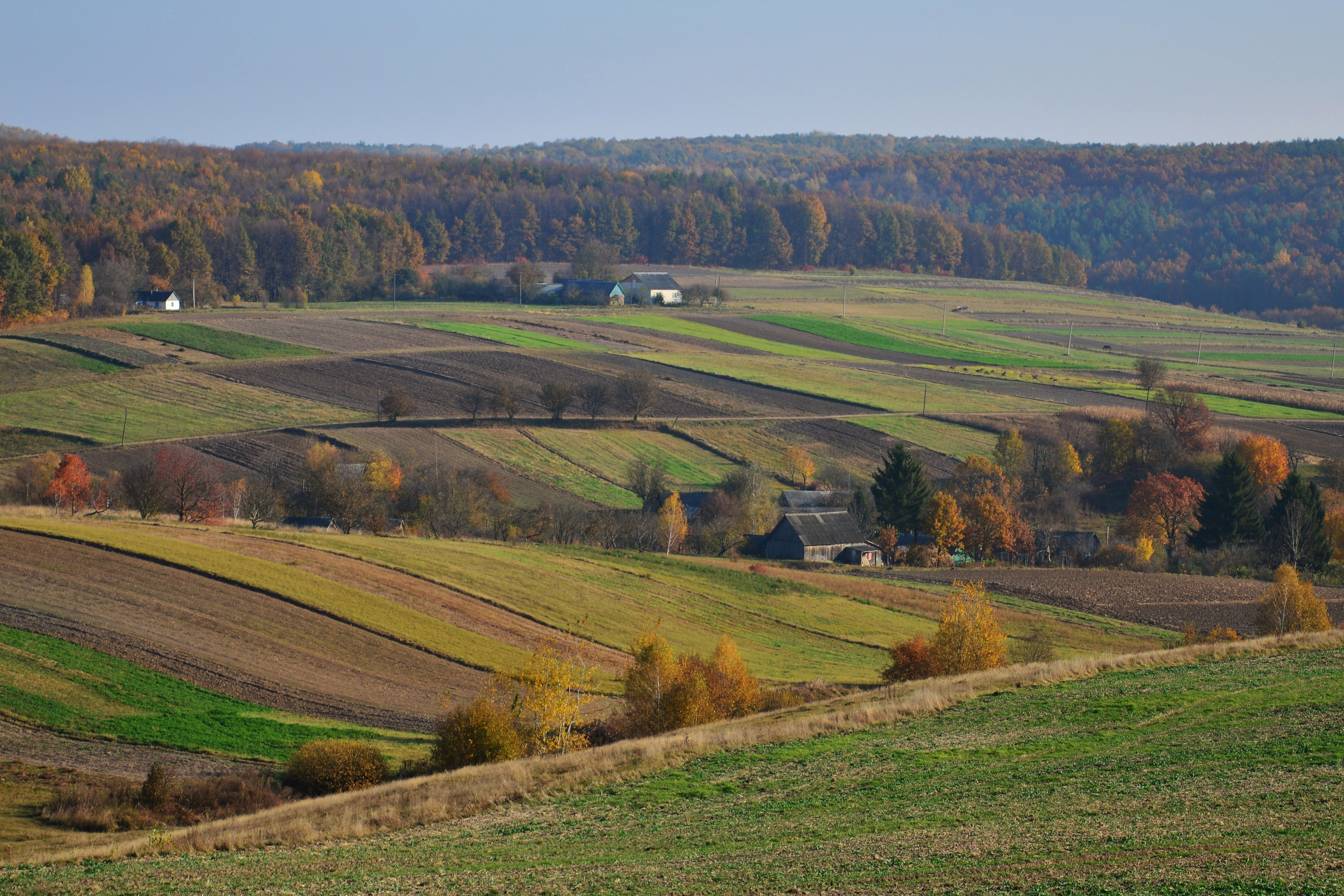 Дермансько-Острозький, Здолбунівський, Острозький райони